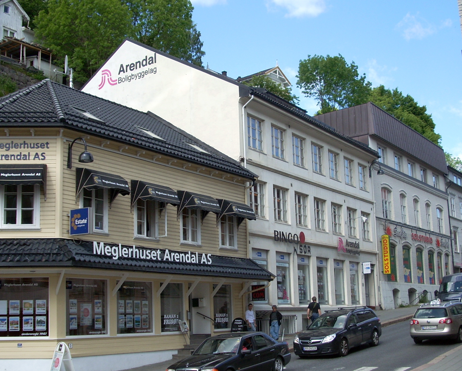 Arendal boligbyggerlag i Arendal